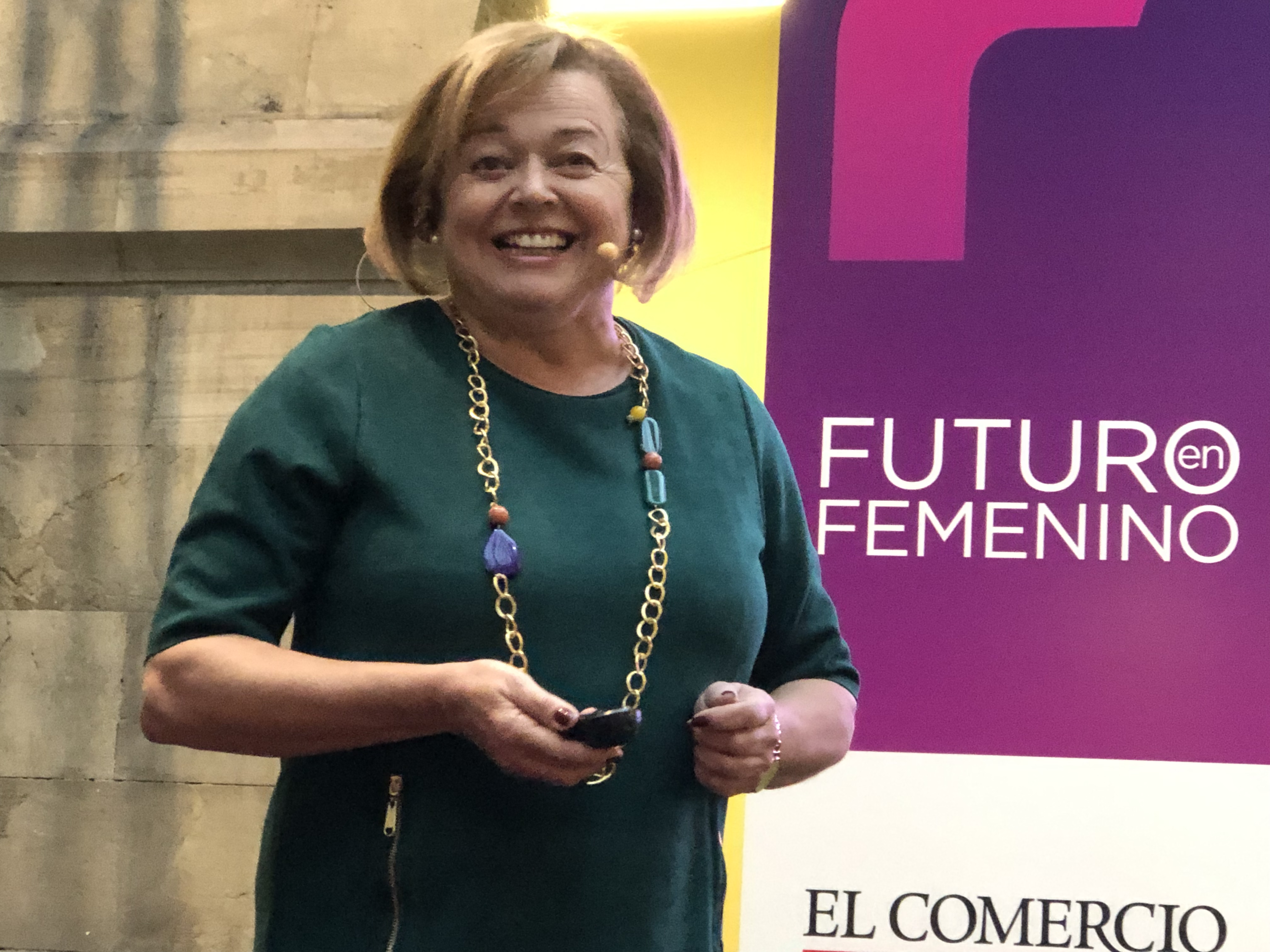 Jornada Futuro en Femenino. Gijón organizada por el diario El Comercio